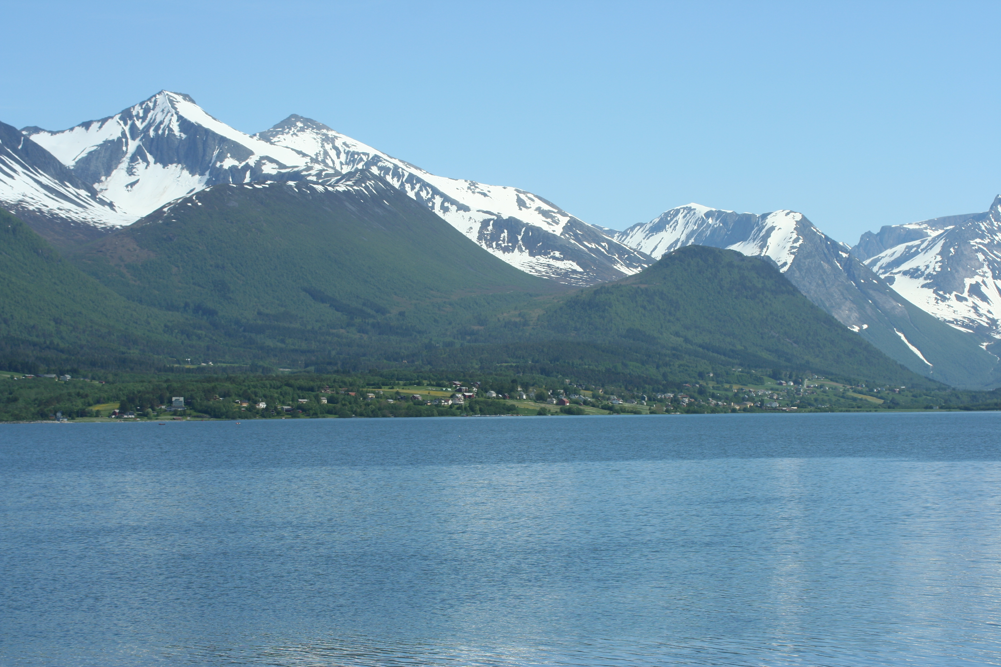 Isfjorden